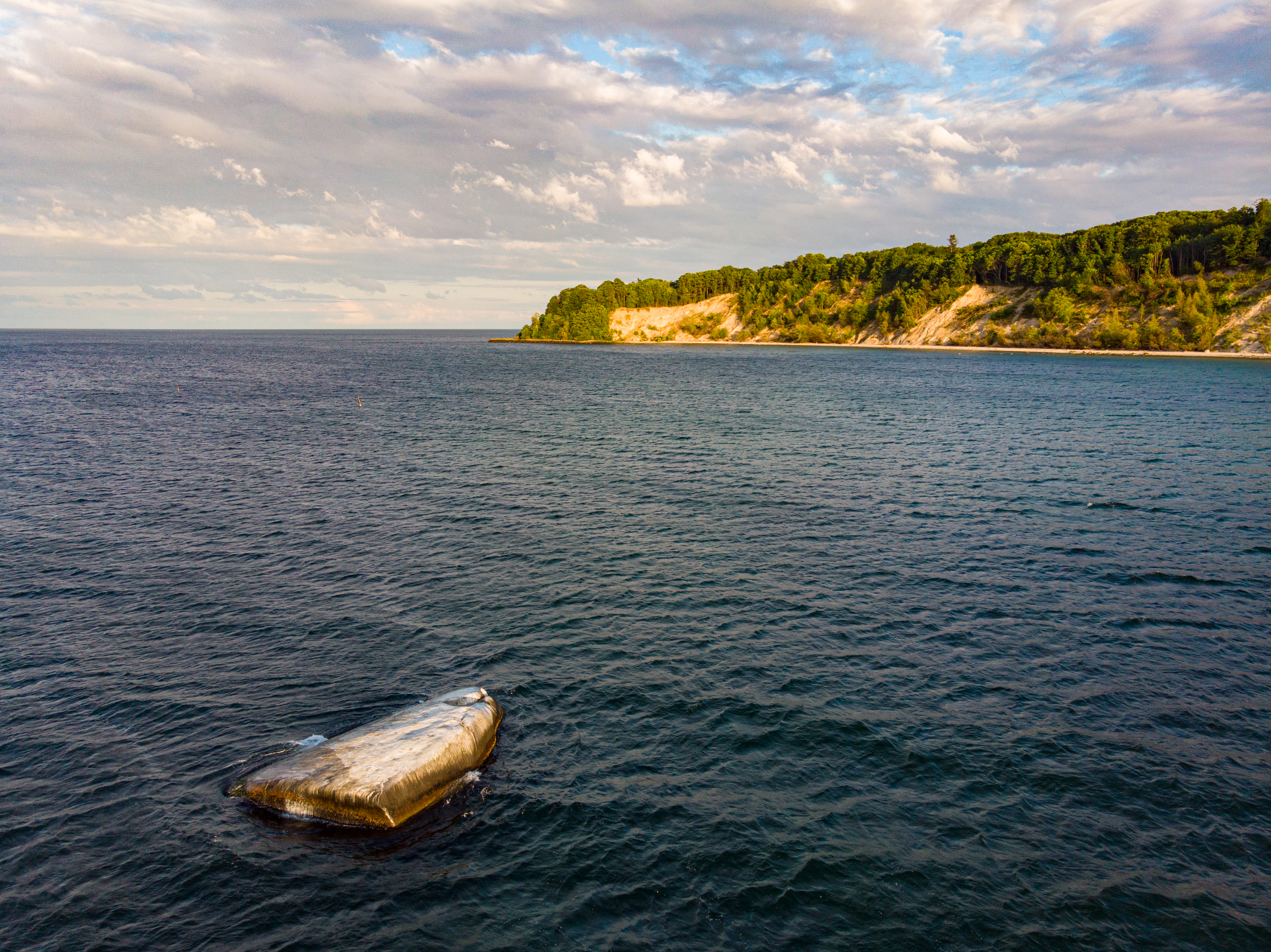 Der Findling Buskam vor dem Seebad Göhren, das Kap Nordperd im Hintergrund.